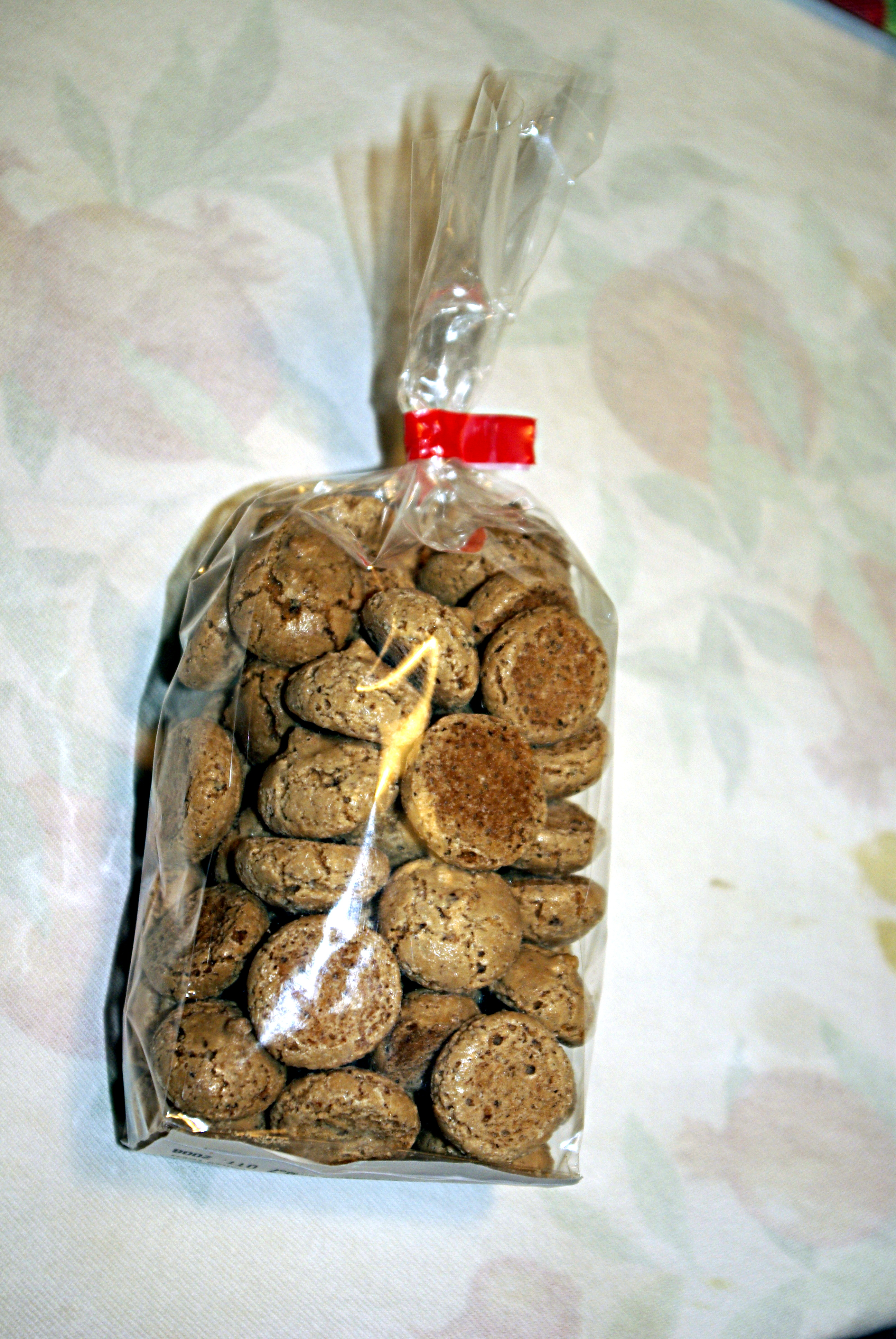 Nocciolini, dolci tipici, di Canzo, Como, Lombardia, Italy